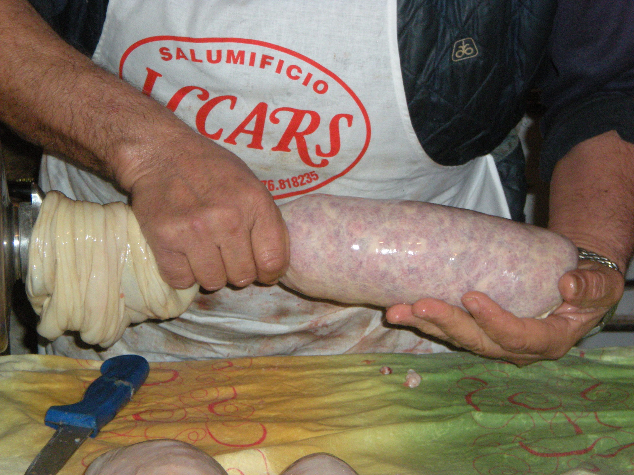 Arte e tradizioni - La nascita del Salame Mantovano